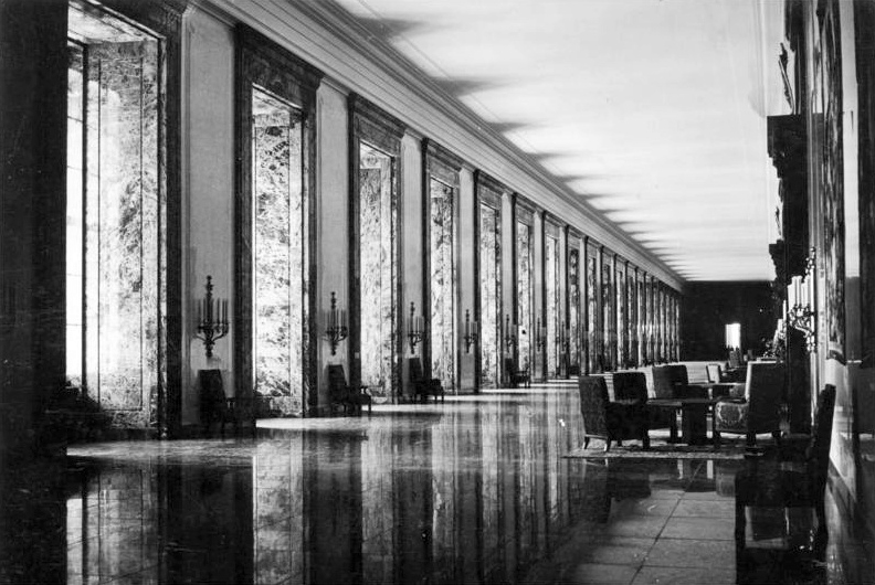 Scherl: Unsere Aufnahme gewährt einen Blick in die sogenannte Lange Halle, die in einer Länge von 146m und einer Breite von 12m durch den ganzen Mittelteil des Erweiterungsbaues vor der Flucht der Arbeitsräume der Adjutanten verläuft und unmittelbaren Zugang zu dem neuen Arbeitszimmer hat. Die Fenster der 9,5m hohen Halle öffnen sich also nach der Voßstrasse hin. Die grossen hellen Wandflächen in Stuckmarmor, von denen sich die Profile der Fenster und Türeinfassungen in dunkelrotem Marmor "deutschrot" abheben, werden später Gobelins nach neuen Entwürfen schmücken. Vorläufig sind die Wandteppiche mit Darstellungen aus dem Leben Alexanders des Grossen vom Kunsthistorischen Staatsmuseum in Wien aufgehängt. Die in kräftigen Formen gehaltenen Wandleuchten sind aus vergoldeter Bronze. ADN-ZB/Archiv 10.1.1939 Im faschistischen Deutschland 1933-1945 Innenansicht des Erweitungsbaus der Reichskanzlei in Berlin. UBz.: Die Marmorgalerie.